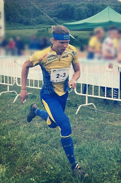 Relay EOC2014